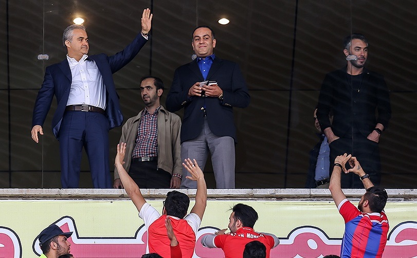 مازِرونی: نساجی و راه آهن خجیر کا